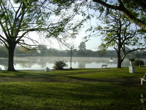 Lagoa Armênia, na cidade de Taquari